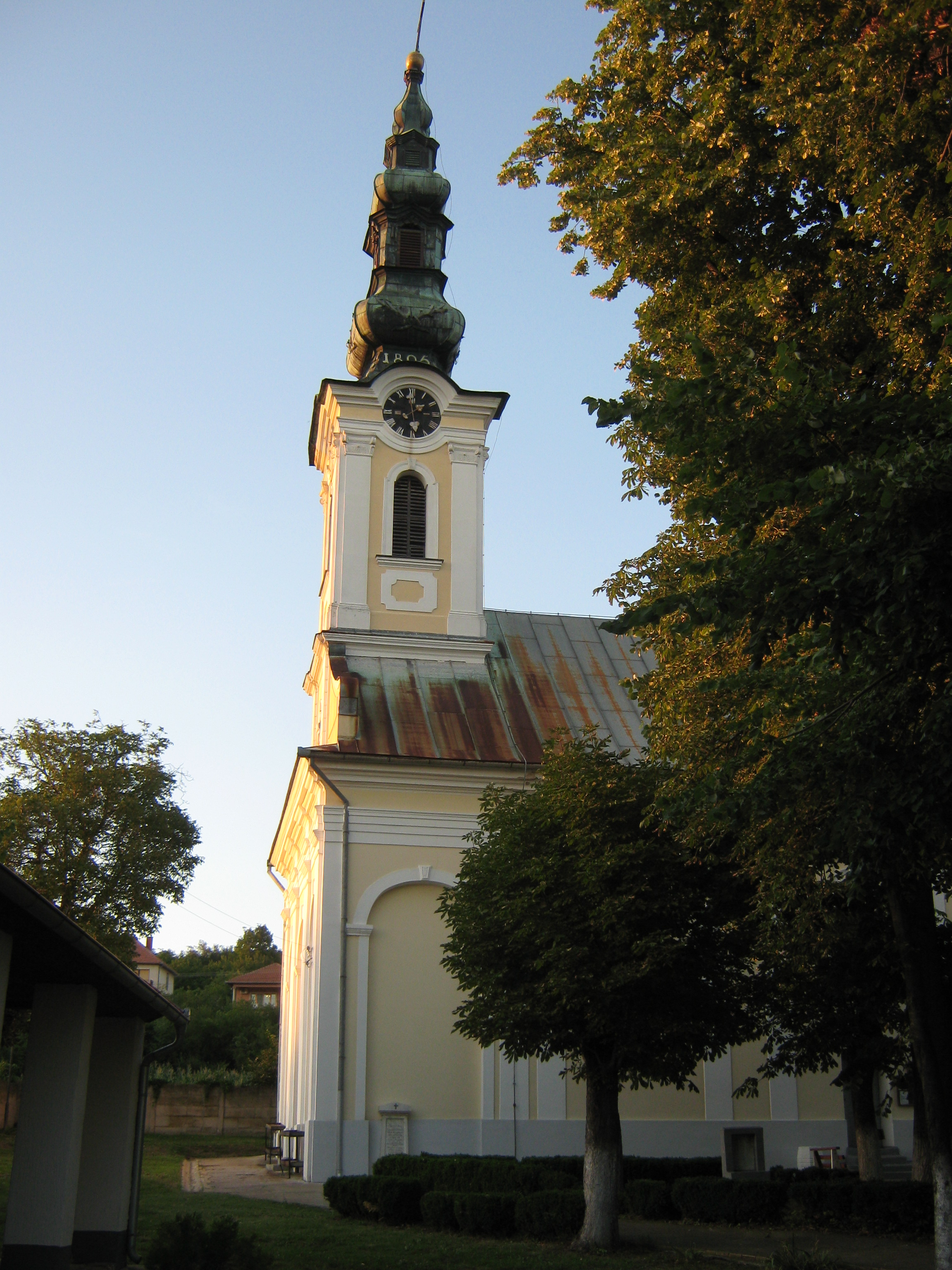 Српска православна црква Св. Петра и Павла у Белој Цркви Na stranici je neko ranije objavio fotografiju rumunske crkve pod ovim nazivom!